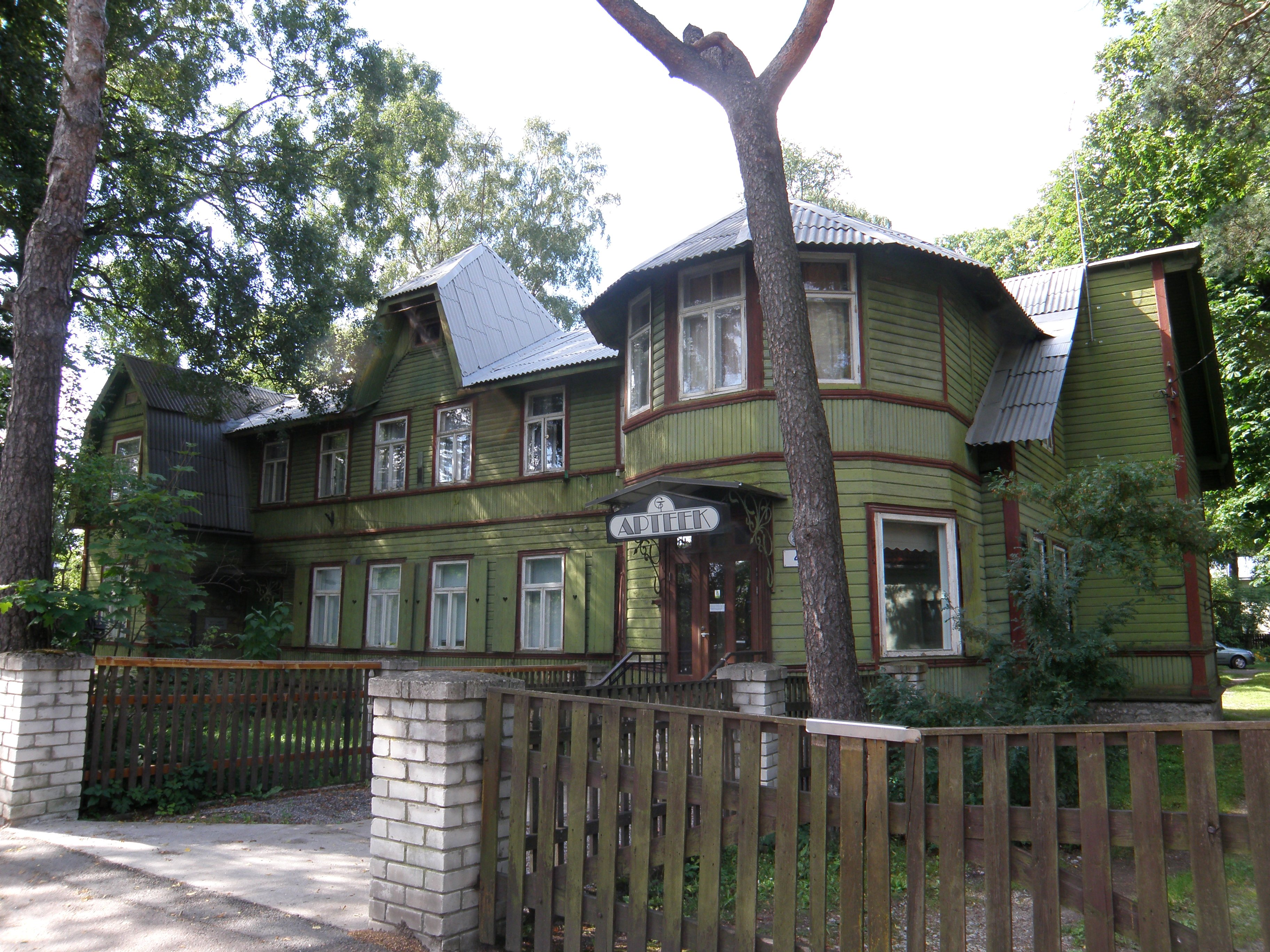 Nõmme vanim apteek